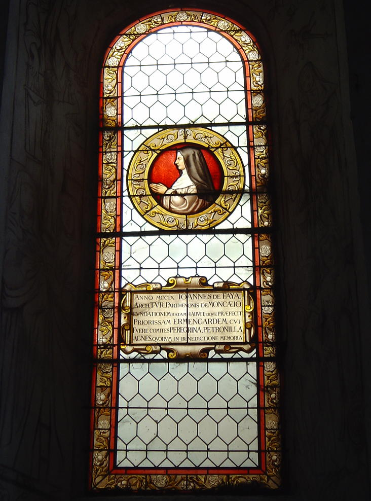 Vitrail du 19ème siècle de l'église Saint Saturnin de Limeray représentant Ermengarde du Plessis, fondatrice de l'abbaye de Moncé. Indre et Loire / France.